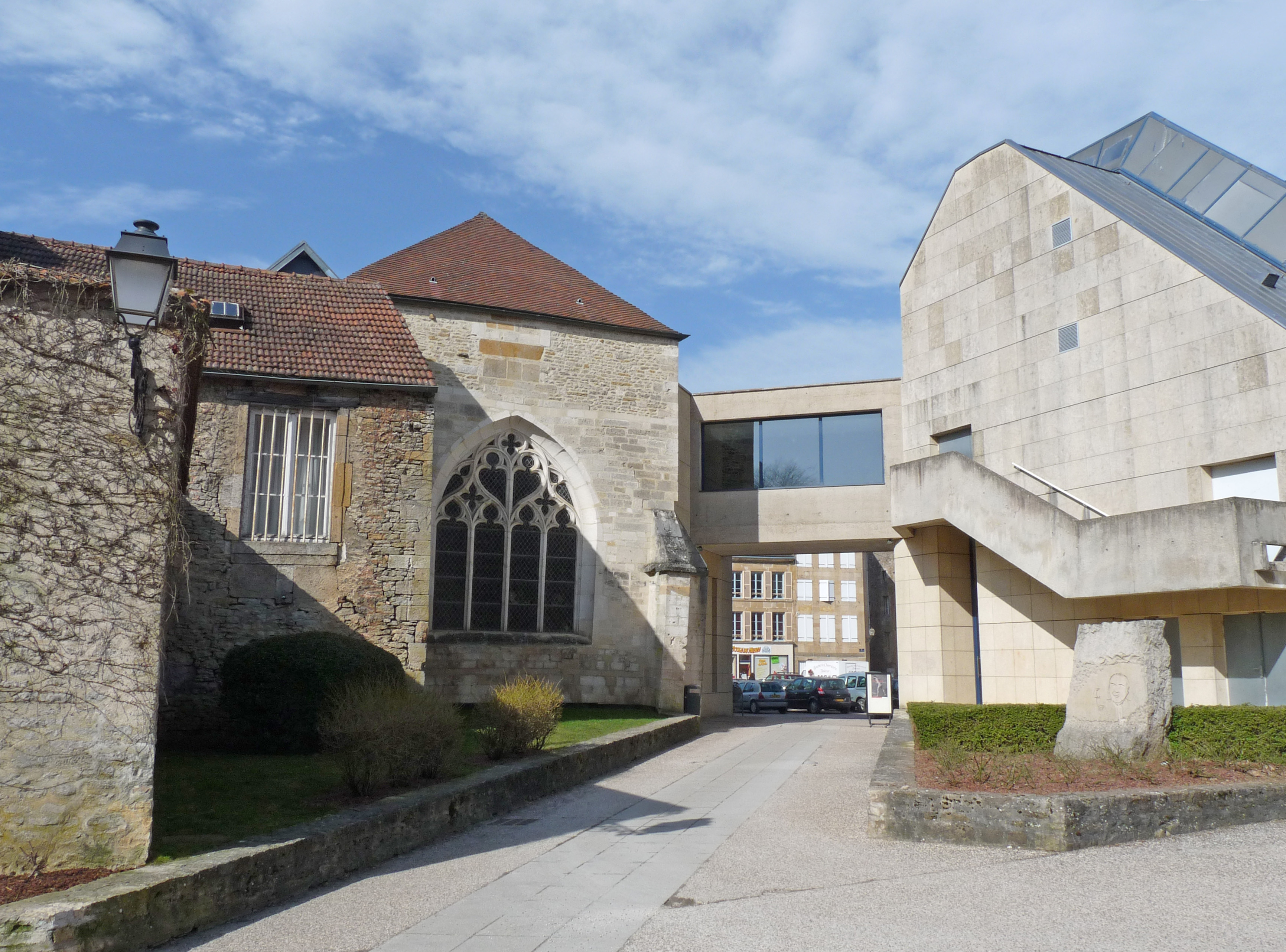 Musée d'art et d'histoire de Langres (Haute-Marne). A droite, au premier plan, stèle François Mitterrand.